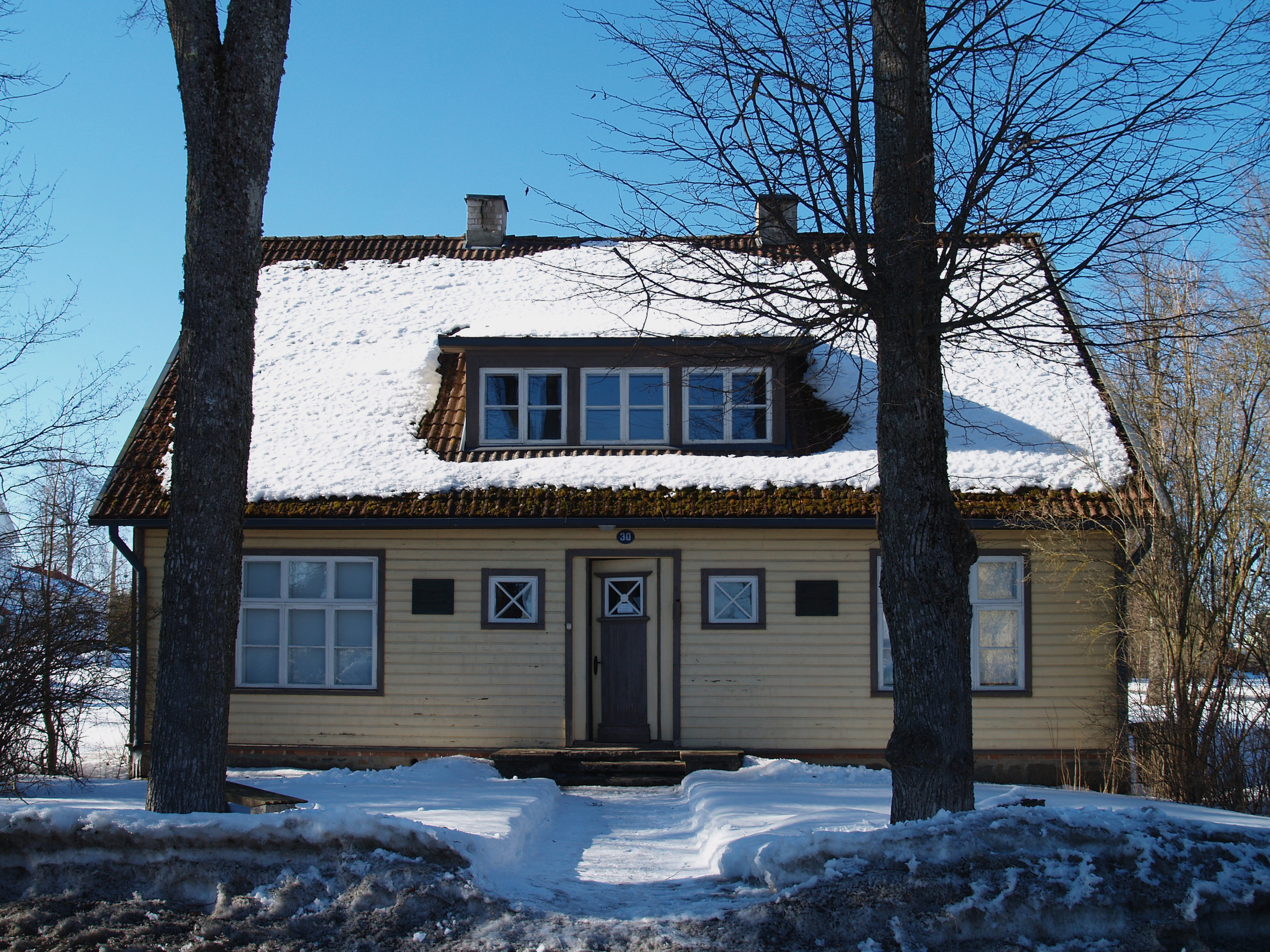 Heliloojate Kappide Majamuuseum